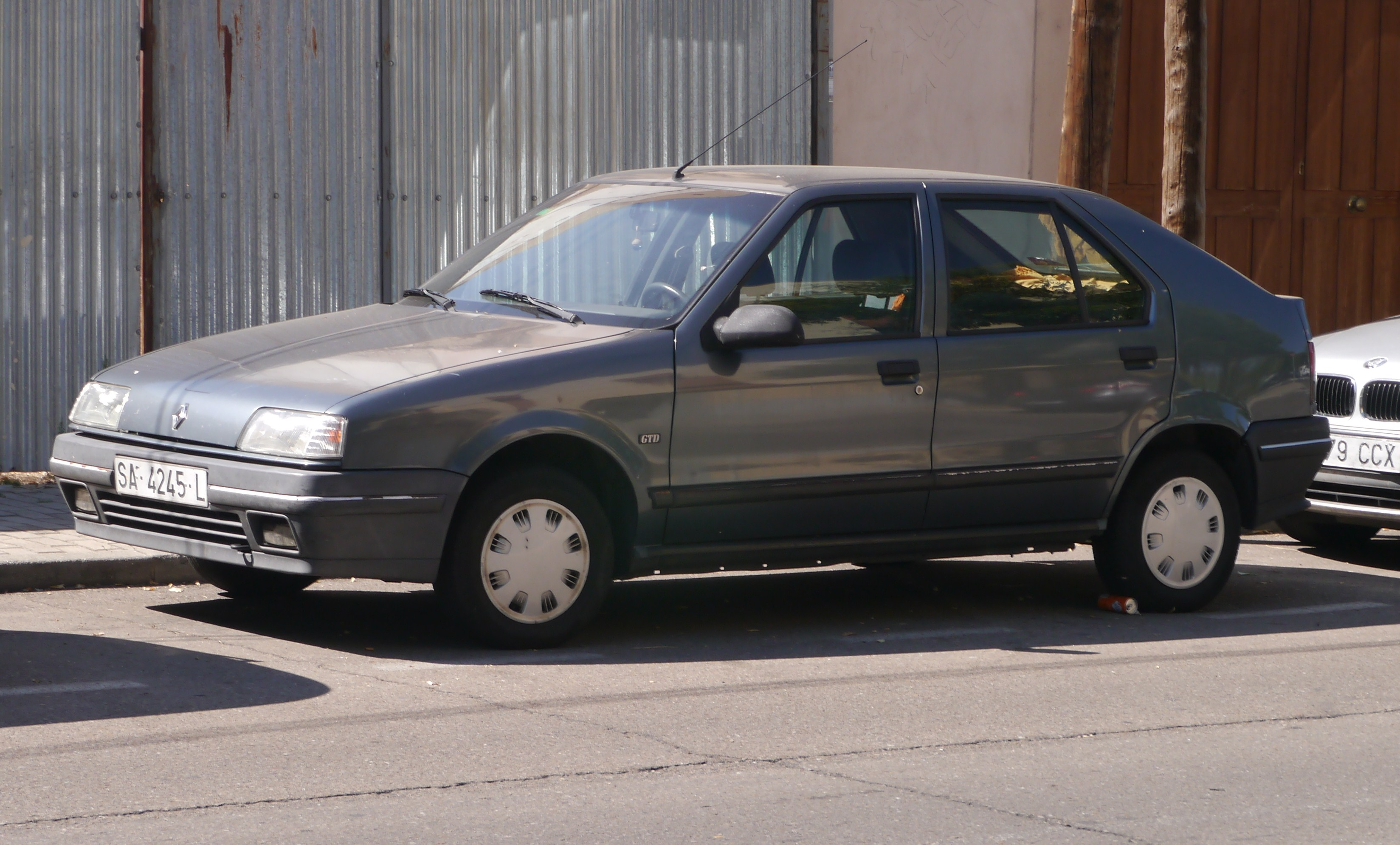 Salmanca, Spain.